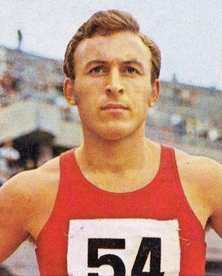 SPORT VEDETTES-PANINI 1974-Figurina n.8- BORZOV (URSS) - ATLETICA LEGGERA -Rec